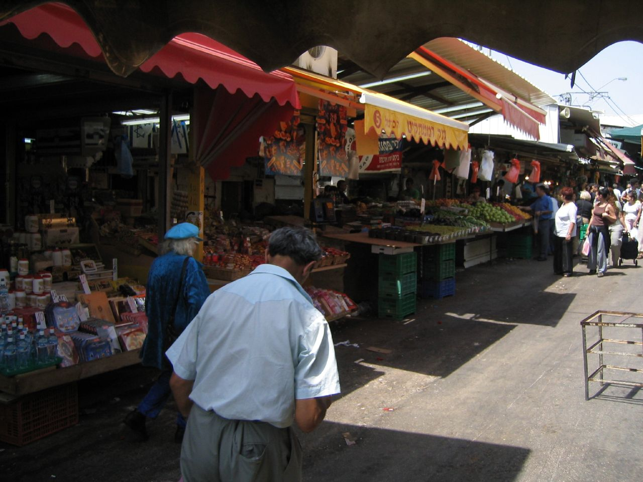 Tel Aviv, Israel, produce market.